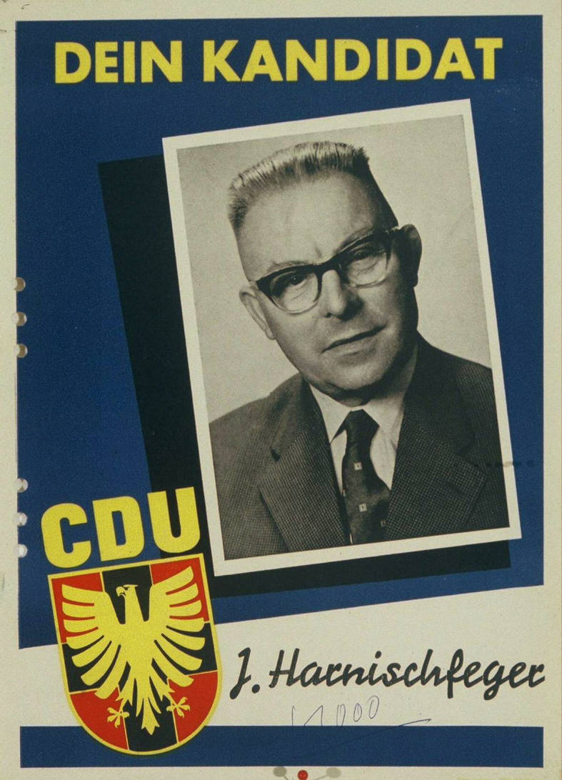 Dein Kandidat Abbildung: Porträtfoto Plakatart: Kandidaten-/Personenplakat mit Porträt Auftraggeber: CDU Westfalen Objekt-Signatur: 10-001: 740 Bestand: Plakate zu Bundestagswahlen (10-001) GliederungBestand10-18: Plakate zu Bundestagswahlen (10-001) » Die 3. Bundestagswahl am 15. September 1957 » CDU » Mit Porträtfoto Lizenz: KAS/ACDP 10-001: 740 CC-BY-SA 3.0 DE